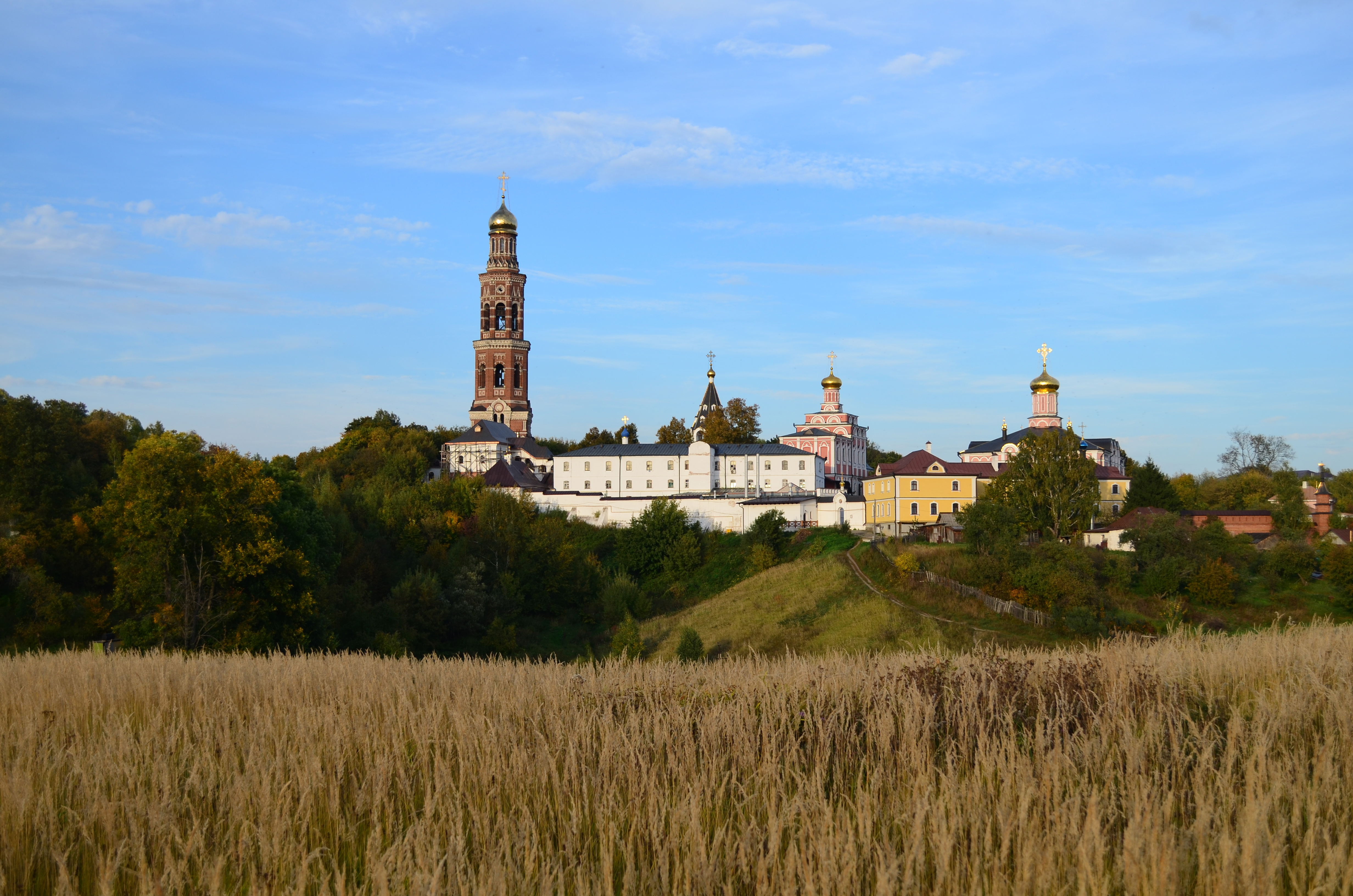 Рязанская область.Иоанно-Богословский монастырь в Пощупово(с12 века).